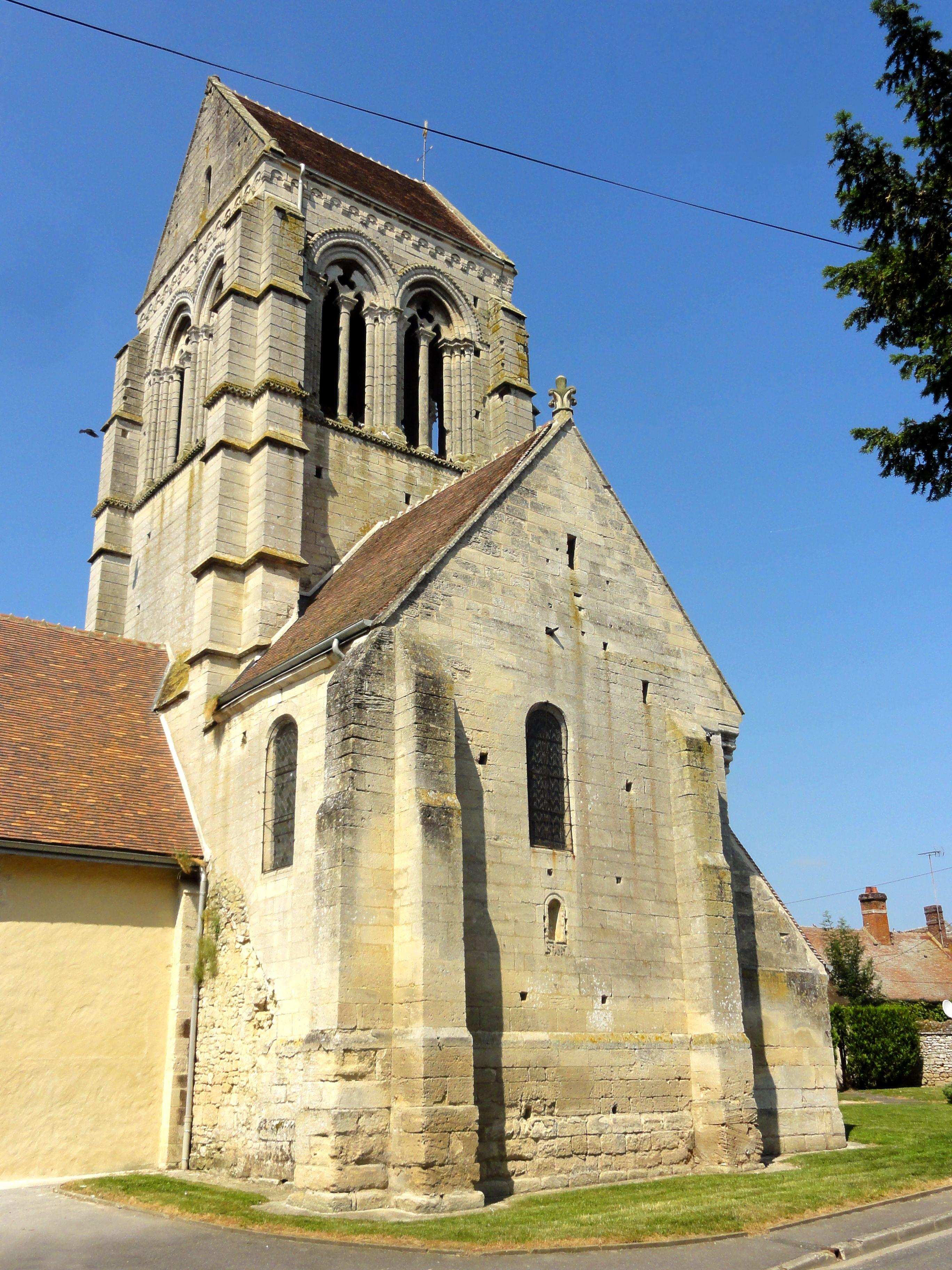 Crosillon sud du transept et clocher.